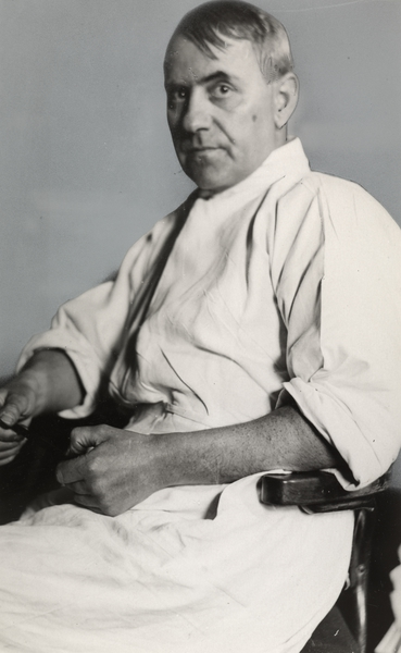 portrett, mann, lege, professor, sittende halvfigur.